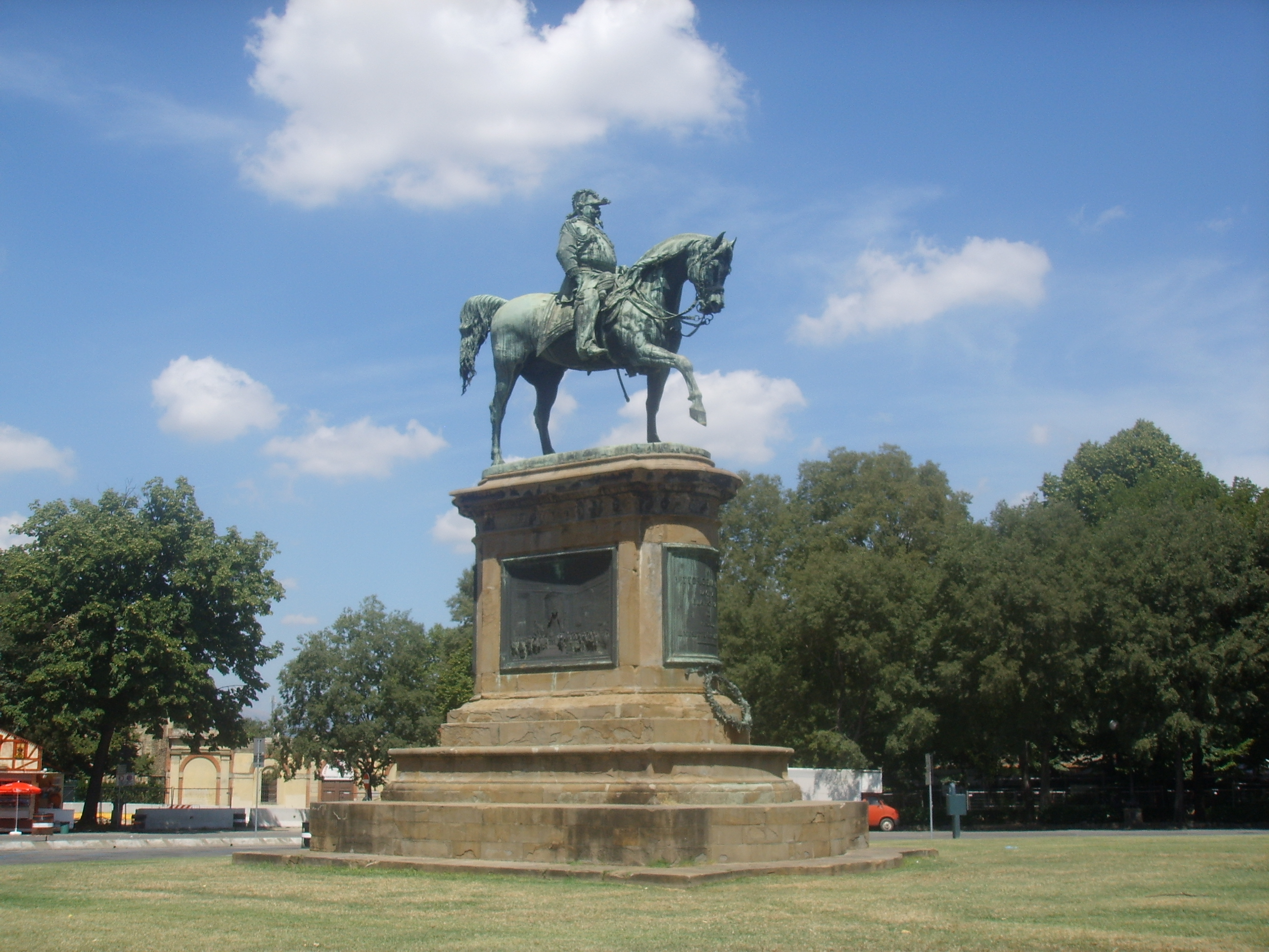 Emilio Zocchi, monumento equestre a Vittorio Emanuele II d'Italia